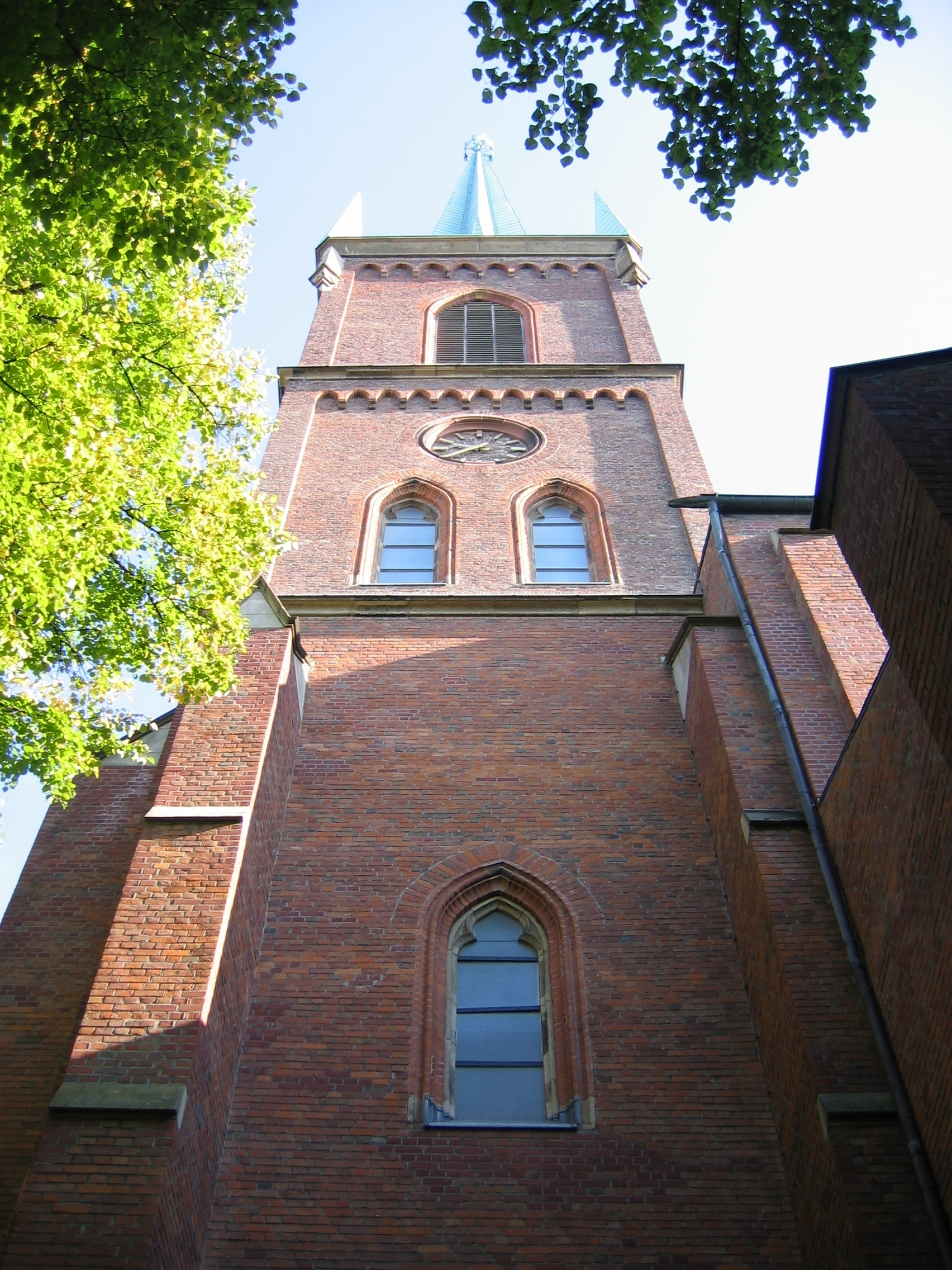 Kath. Liebfrauenkirche in Köln-Mülheim